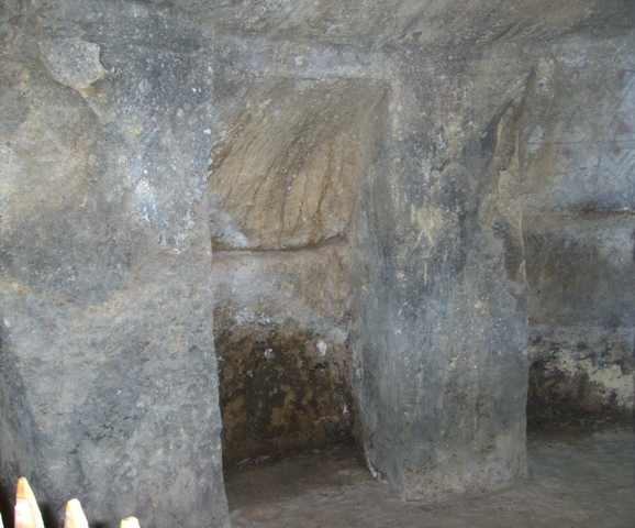 Otra bella montaña